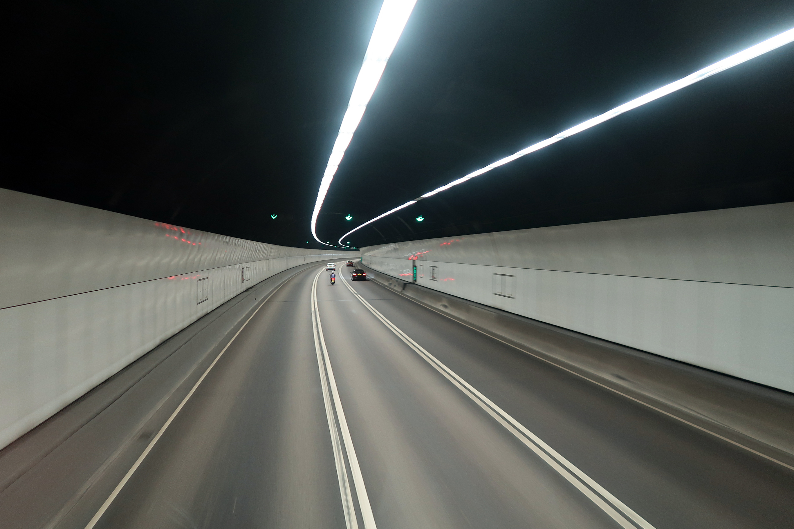 Cheung Tsing Tunnel interior